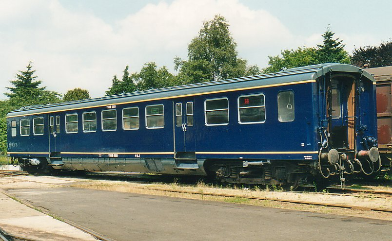 Plan E rijtuig B6609 van de VSM te Beekbergen.